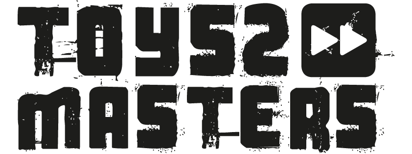 Aktuelles Logo des Toys2Masters-Bandcontests